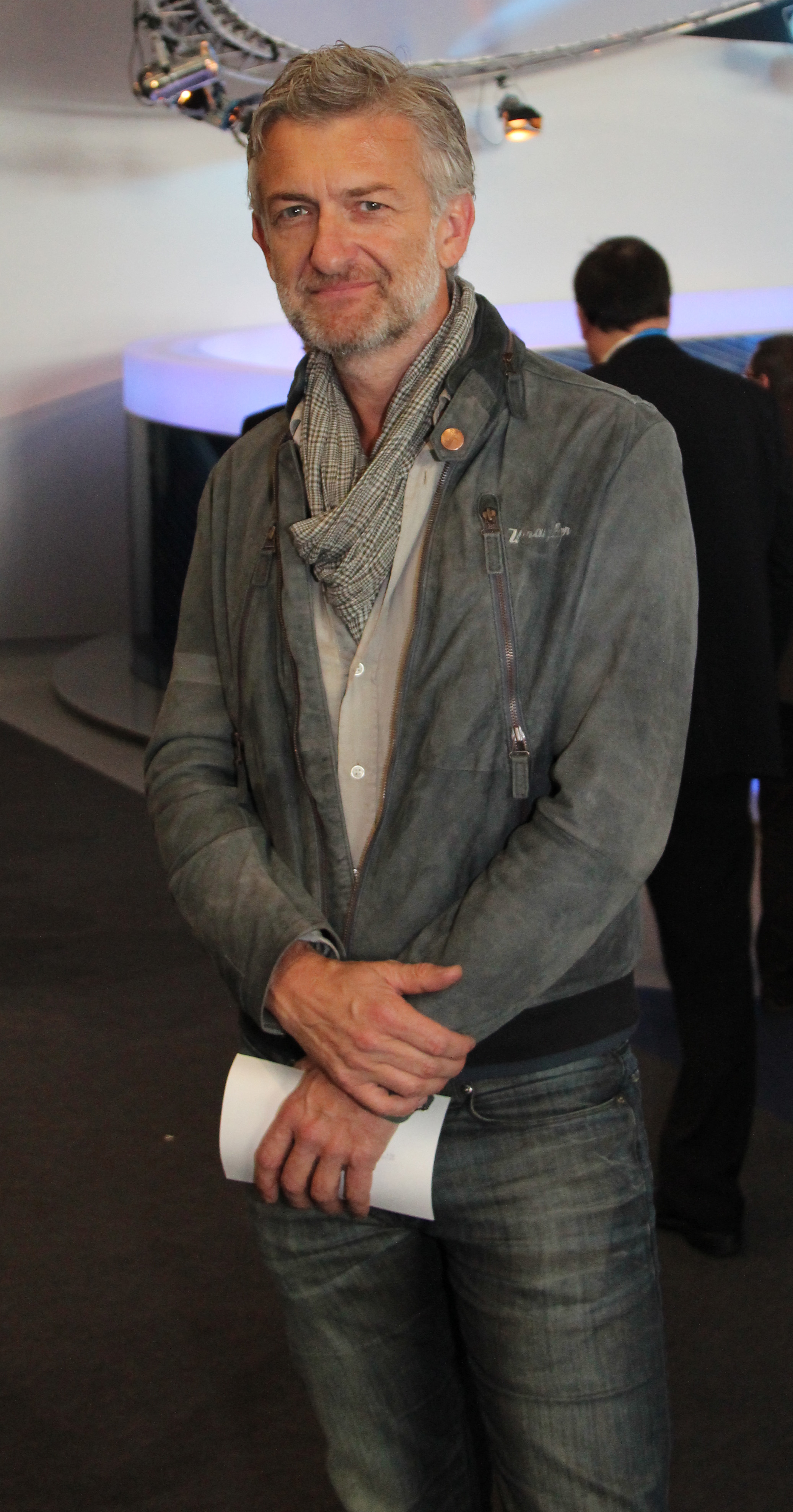 Dominic Raacke auf der Frankfurter Buchmesse 2011